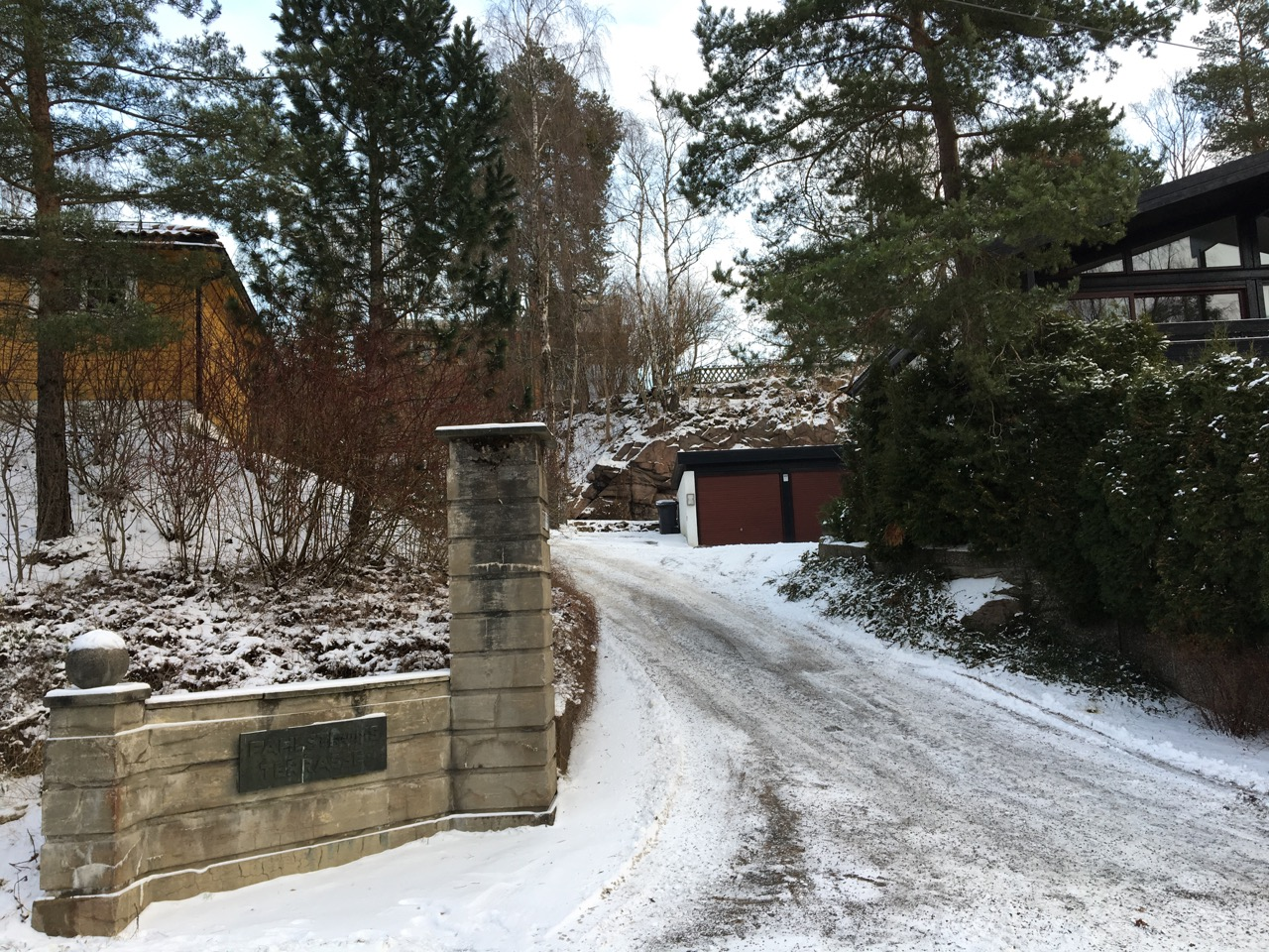 Fahlstrøms terasse sett nedenfra om vinteren.